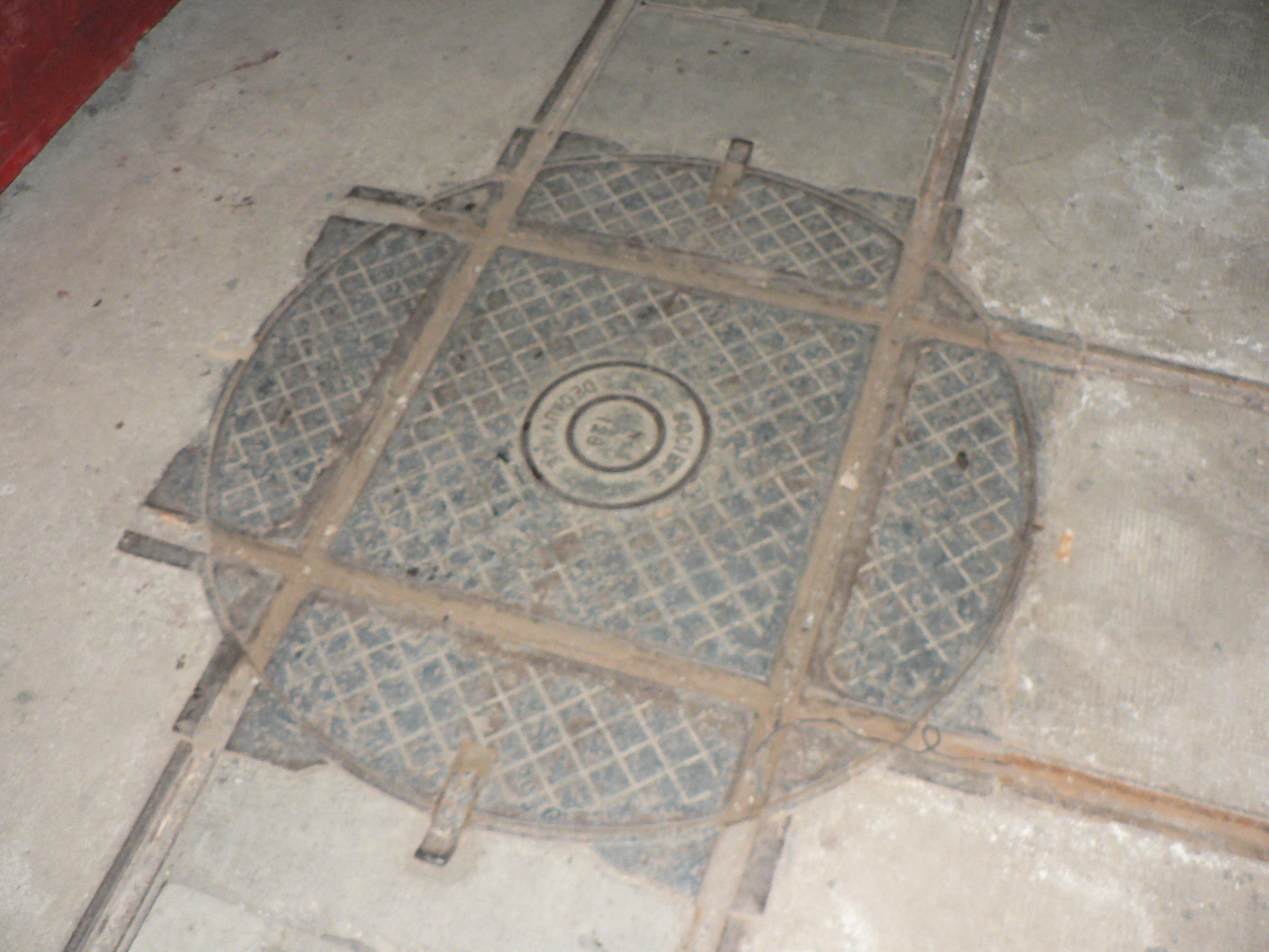 Fort Saint-Gobain, Modane Decauville rail system